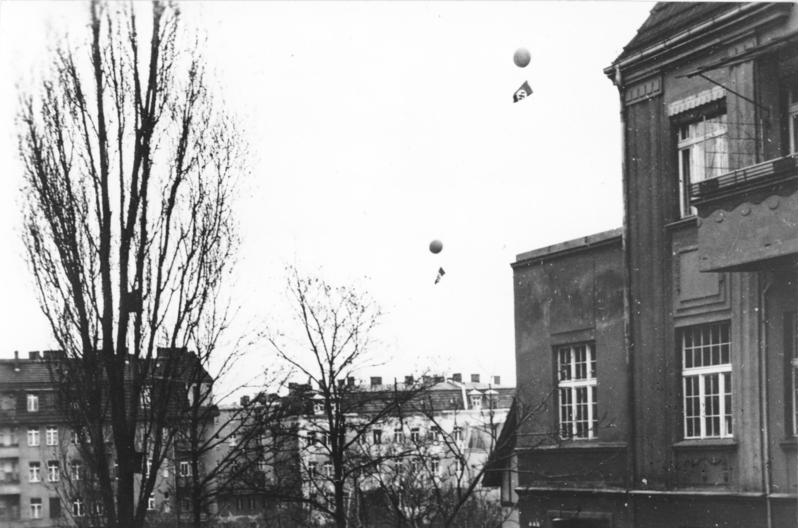 Berlin, Reichspräsidentenwahl, Wahlpropaganda Wahlpropaganda (Hakenkreuzballonaufstieg) der NSDAP, Sektion Botanischer Garten Berlin, zur zweiten Reichspräsidentenwahl, April 1932.